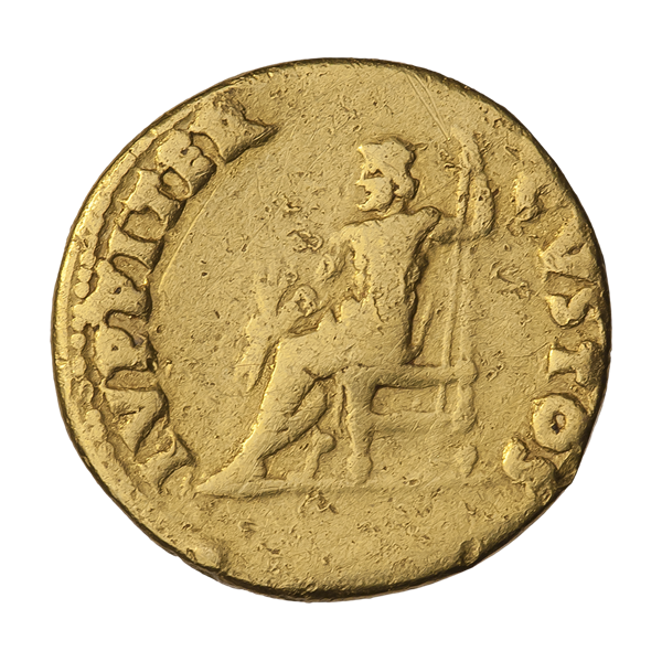 Ауреус. Нерон. Ок. 64—68 гг. (реверс). Надпись IVPPITER CVSTOS. Юпитер сидящий на троне, влево; держит в правой руке молнии и скипетр, в левой — длинное копьё. Template:Aureus de Néron R/ Jupiter assis tenant le foudre IVPPITER CVSTOS